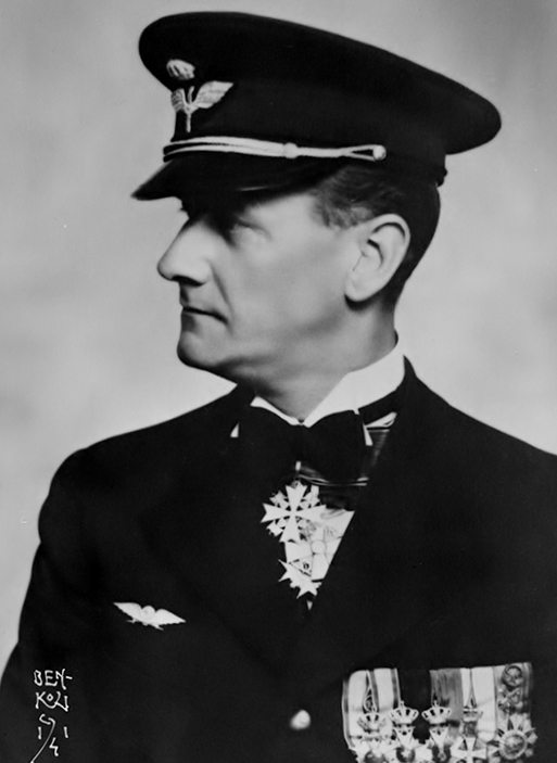 Porträttfotografi av Harald Enell, chef för F 2 Hägernäs 1934-1936. Tillhör F2-samlingen med nummer F2 FM 497. Ur Flygvapenmuseums bildarkiv.